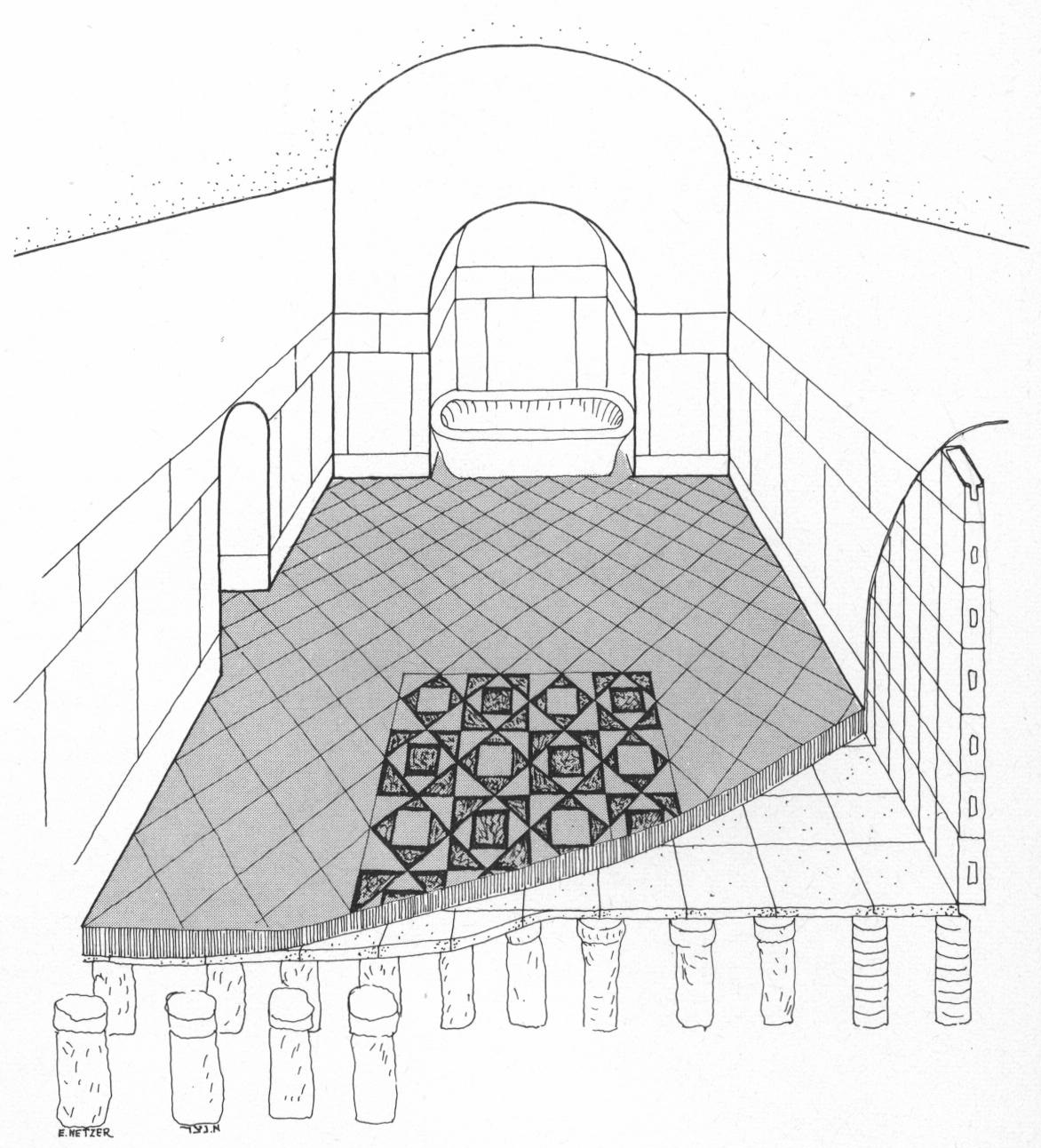 שחזור אחד מחדרי בית-המרחץ שבפסגה